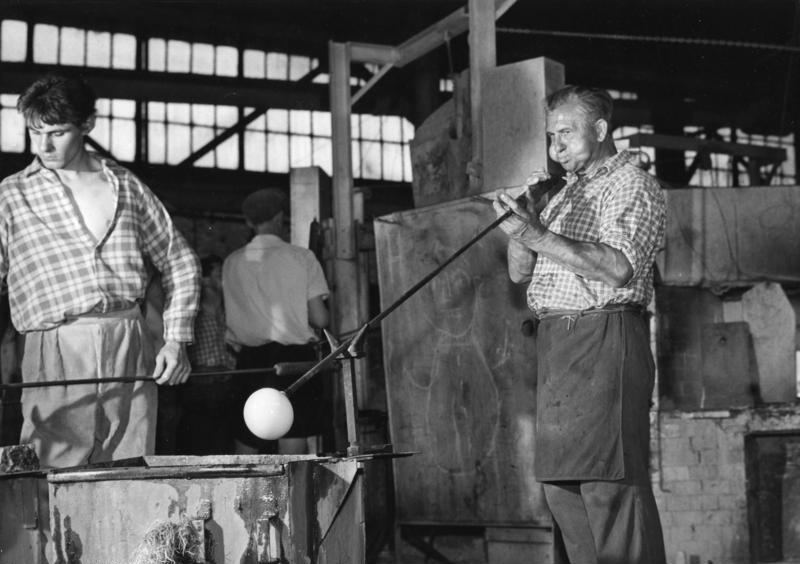 Glashüttenwerke Peill und Putzler, Düren